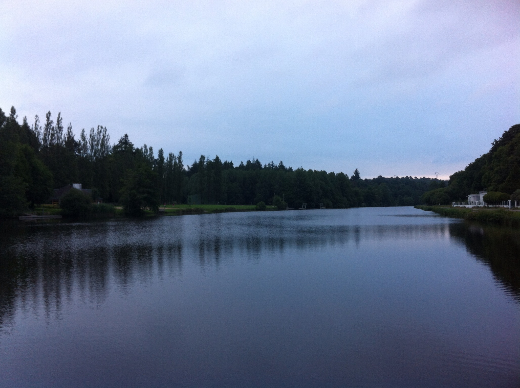 Vue depuis le barrage de Lochrist